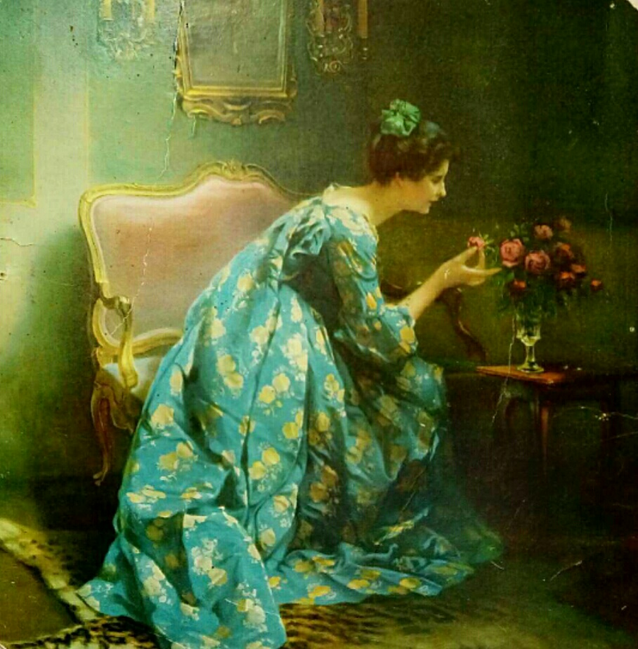 Виктор Шрамм “Идеальный аромат” (A Perfect Scent) , 1897 г.